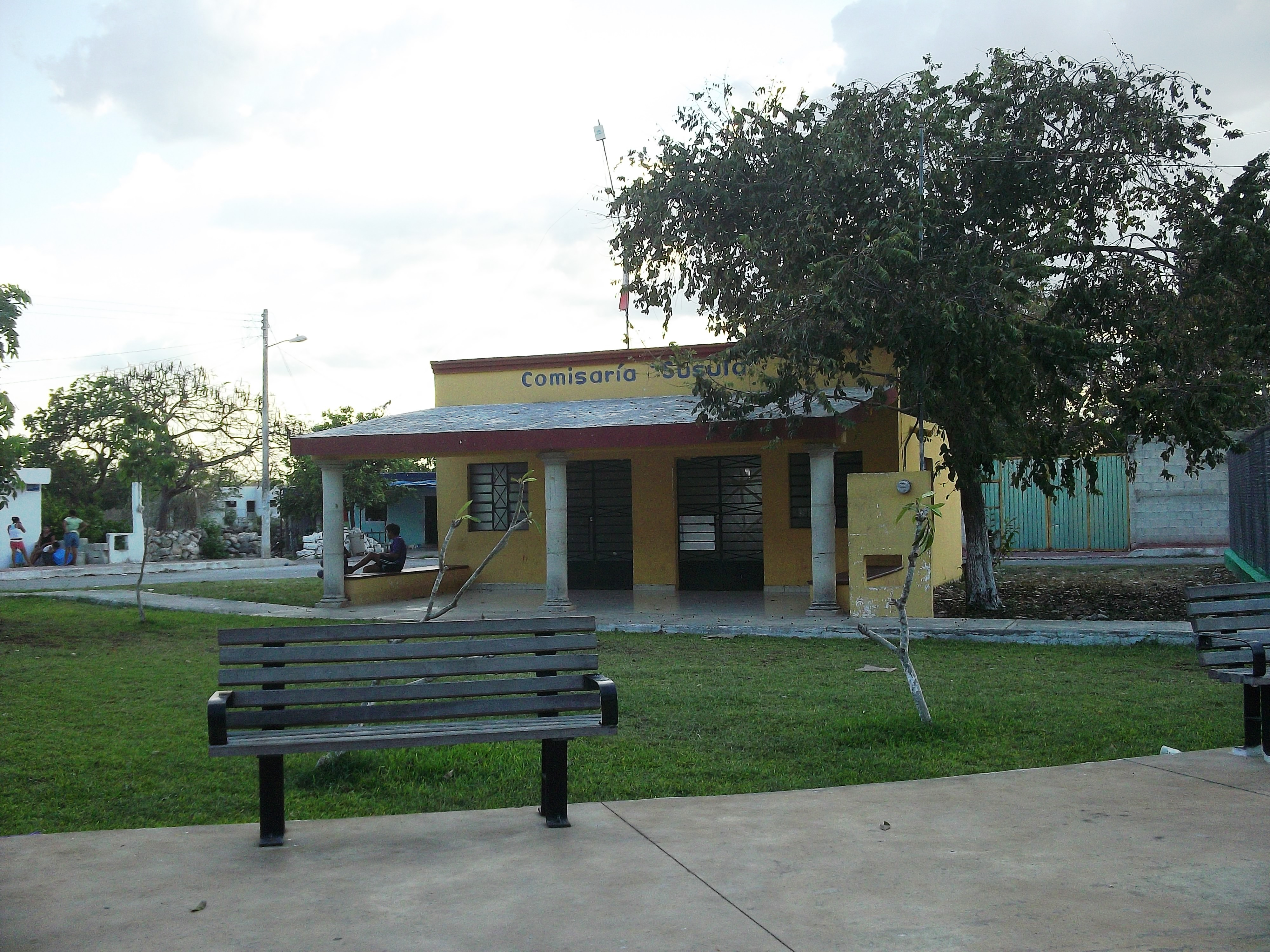 Casa comisarial de Susulá, Yucatán.